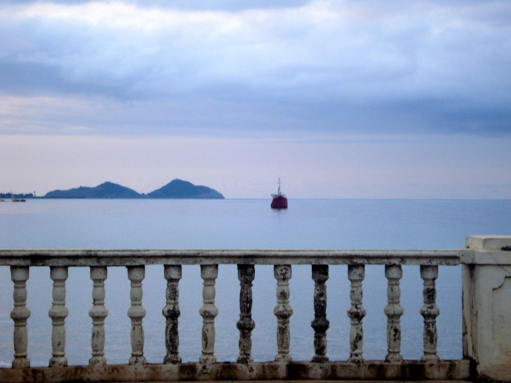 São Tomé e Príncipe